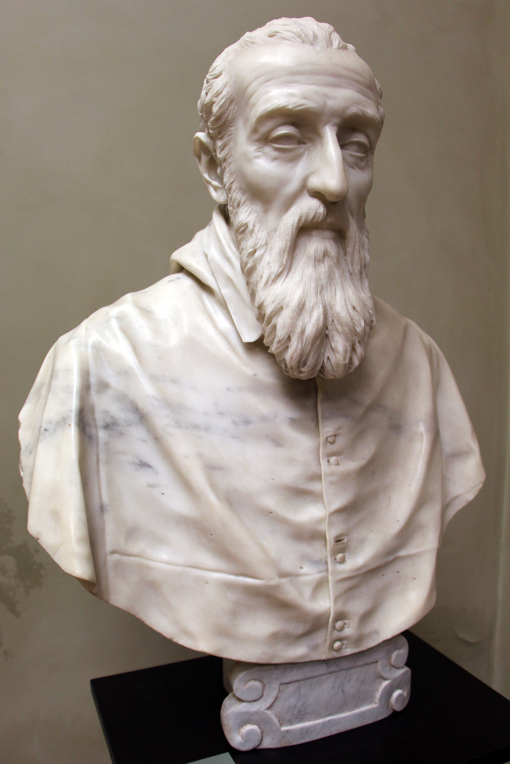 Galleria G. Franchetti alla Ca' d'Oro - MIBAC The making of this document was supported by Wikimedia CH. (Submit your project!) For all the files concerned, please see the category Supported by Wikimedia CH. This is a photo of a monument which is part of cultural heritage of Italy.